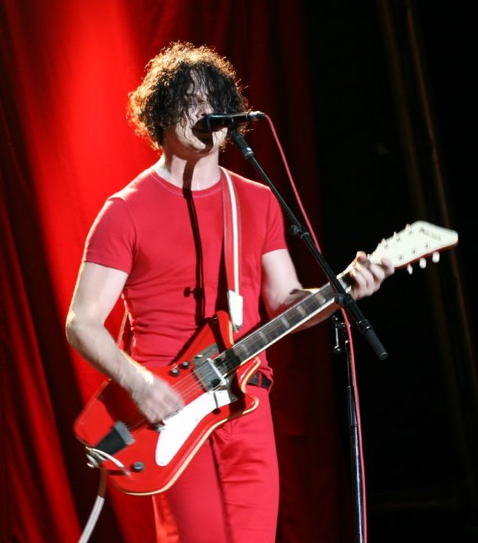 Primavera @ playlist.fluctuat